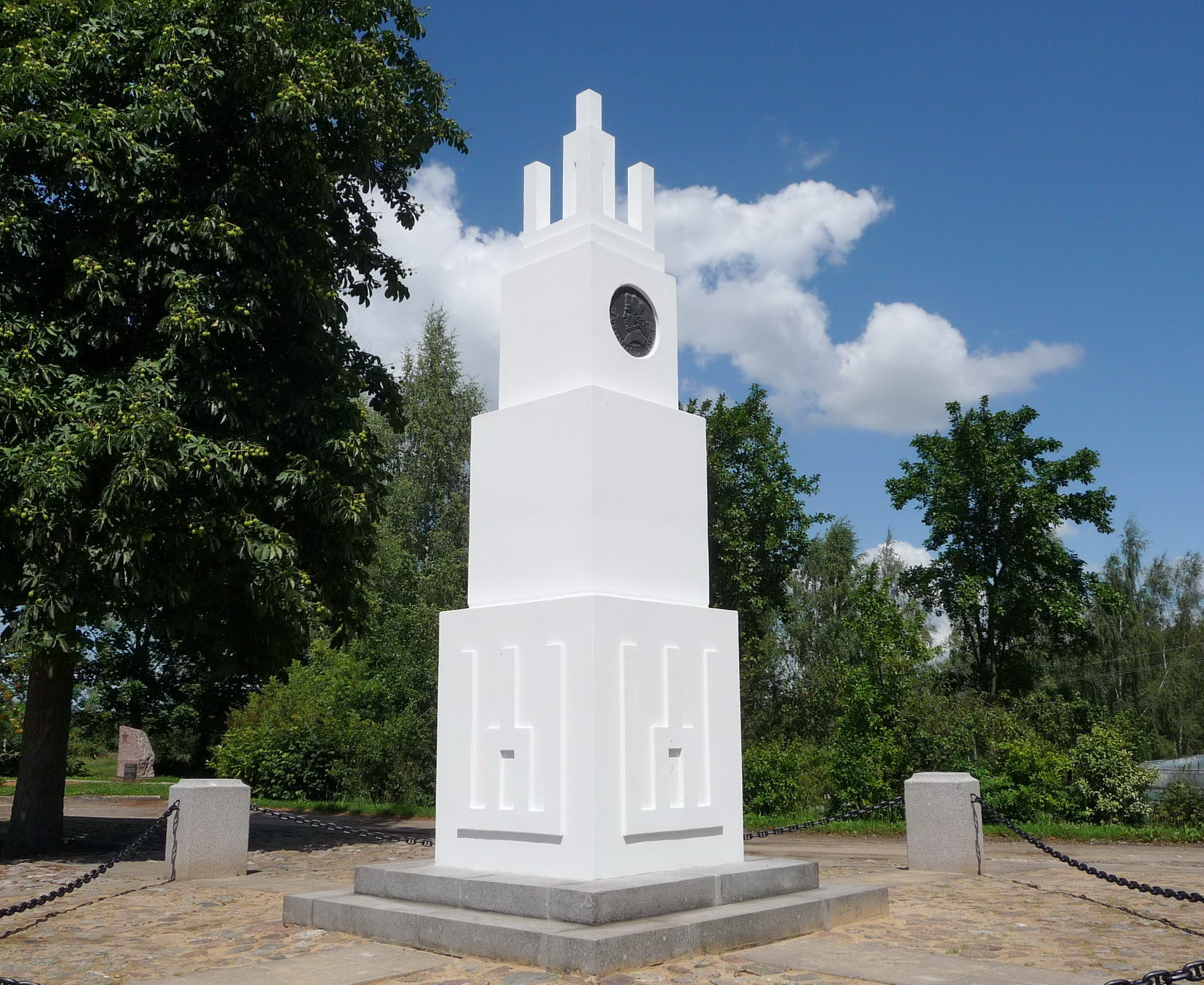 Vytauto Didžiojo paminklas Kudirkos Naumiestyje, Šakių r.